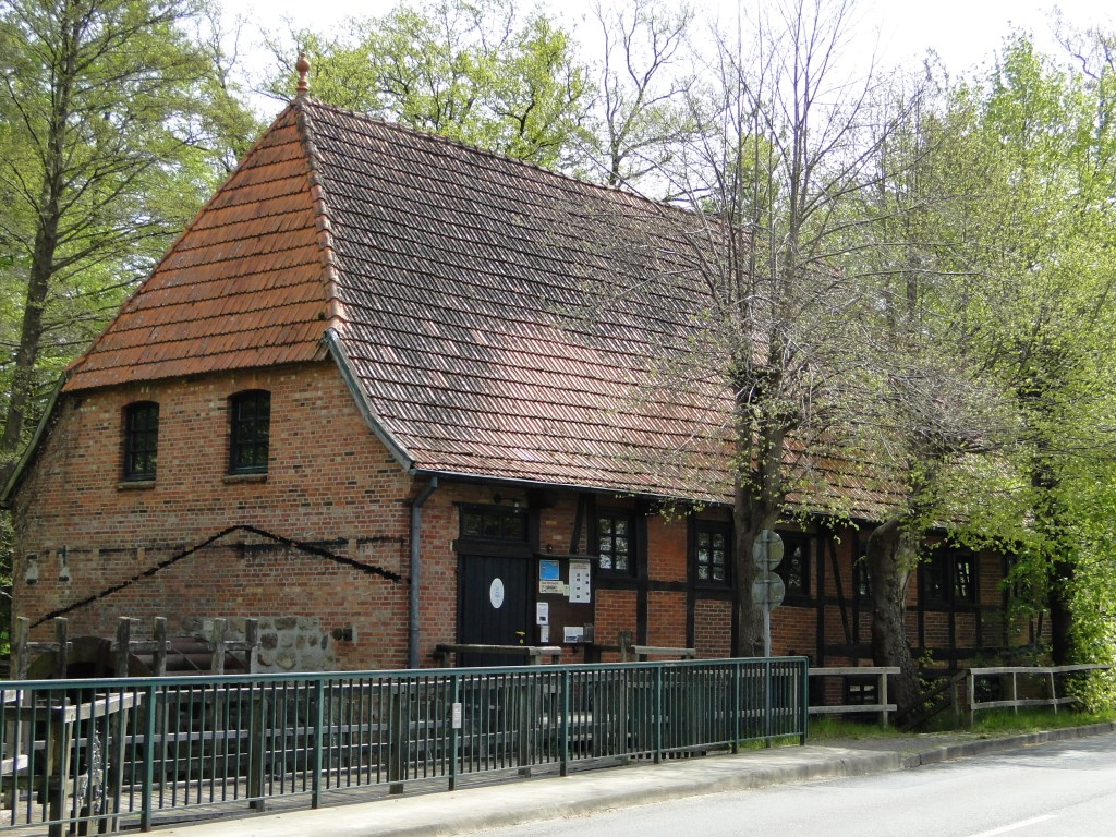 Holmer Mühle Frontansciht